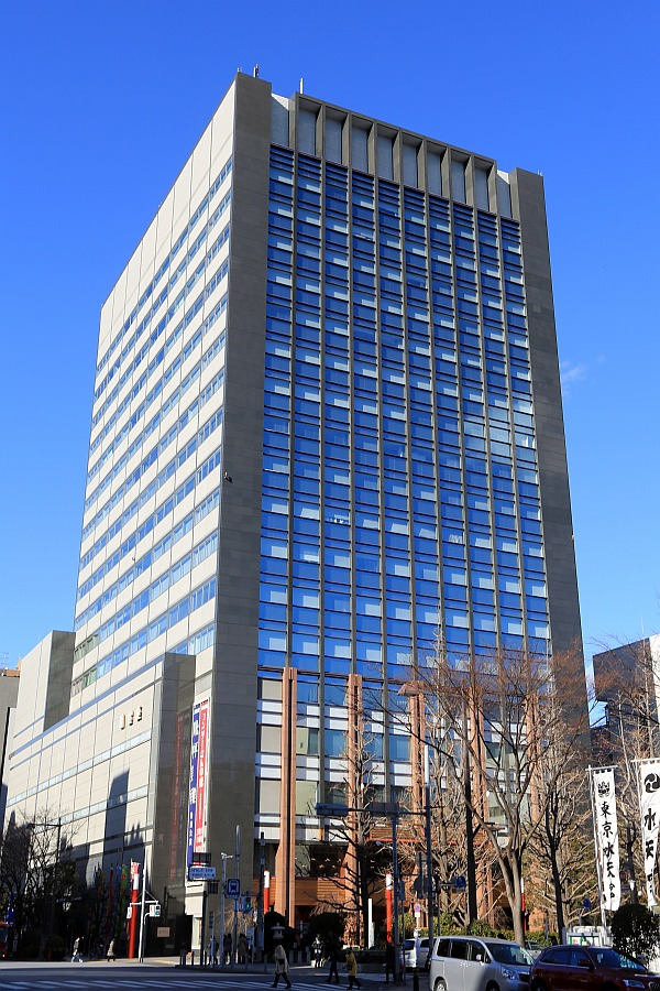 浜町センタービル